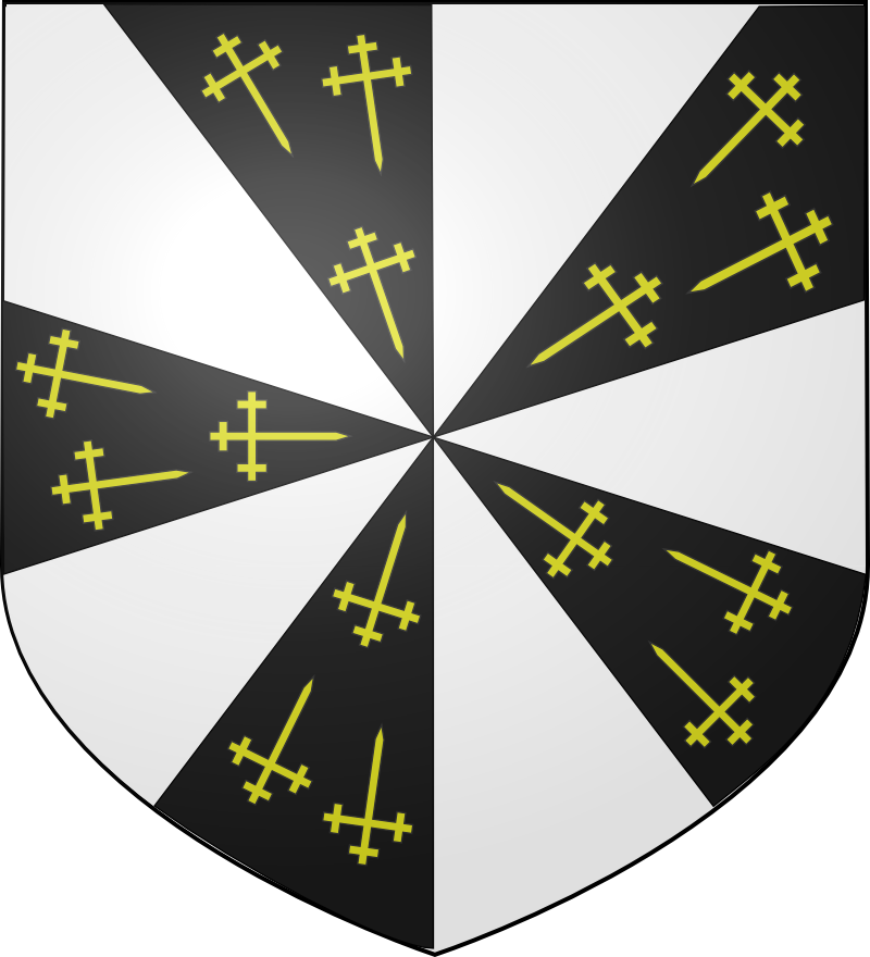 Gironné de sable et d'argent de dix pièces, chaque giron de sable chargé de trois croix recroisettées au pied fiché d’or.